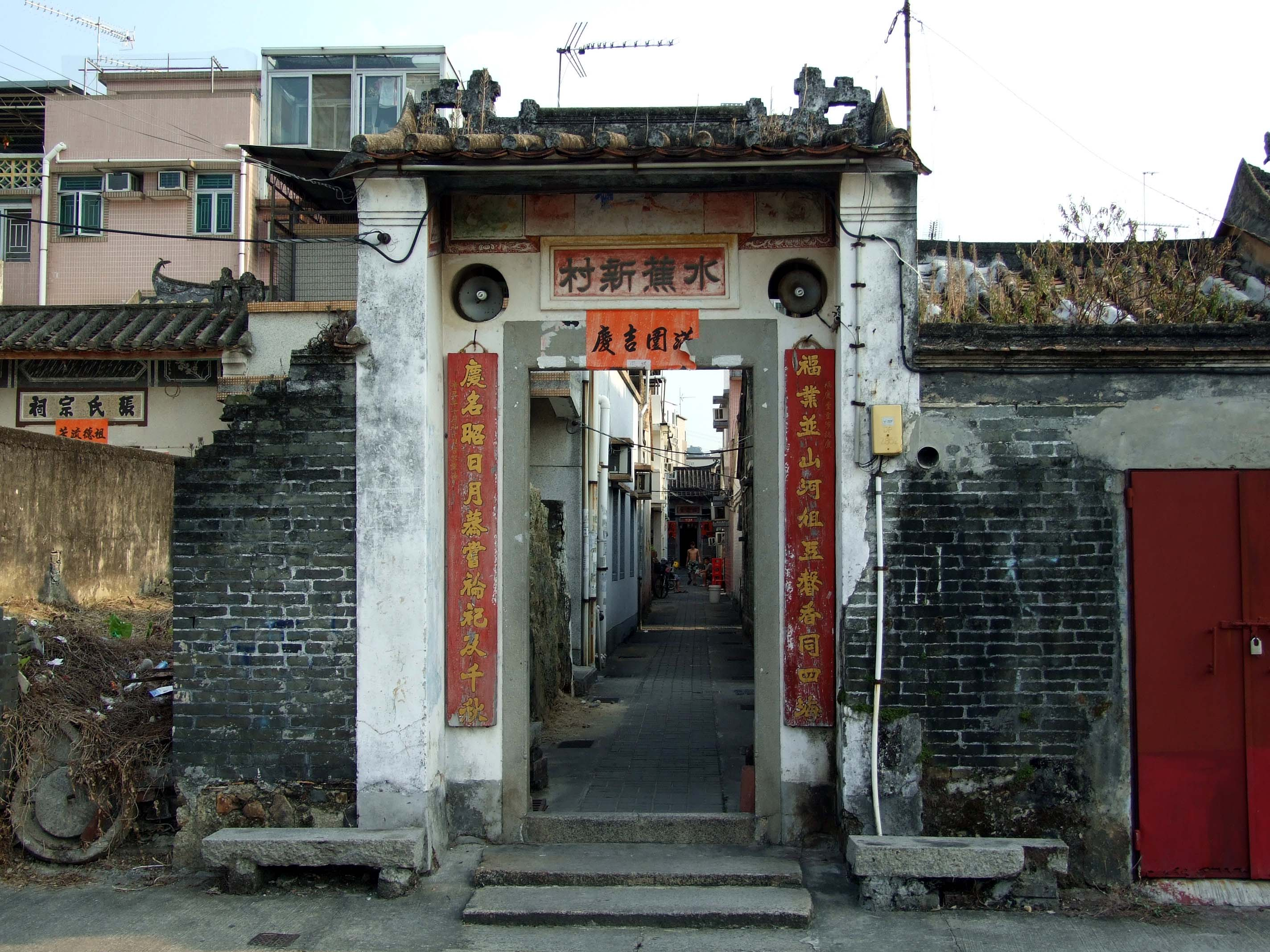 中文（香港）: 十八鄉水蕉新村